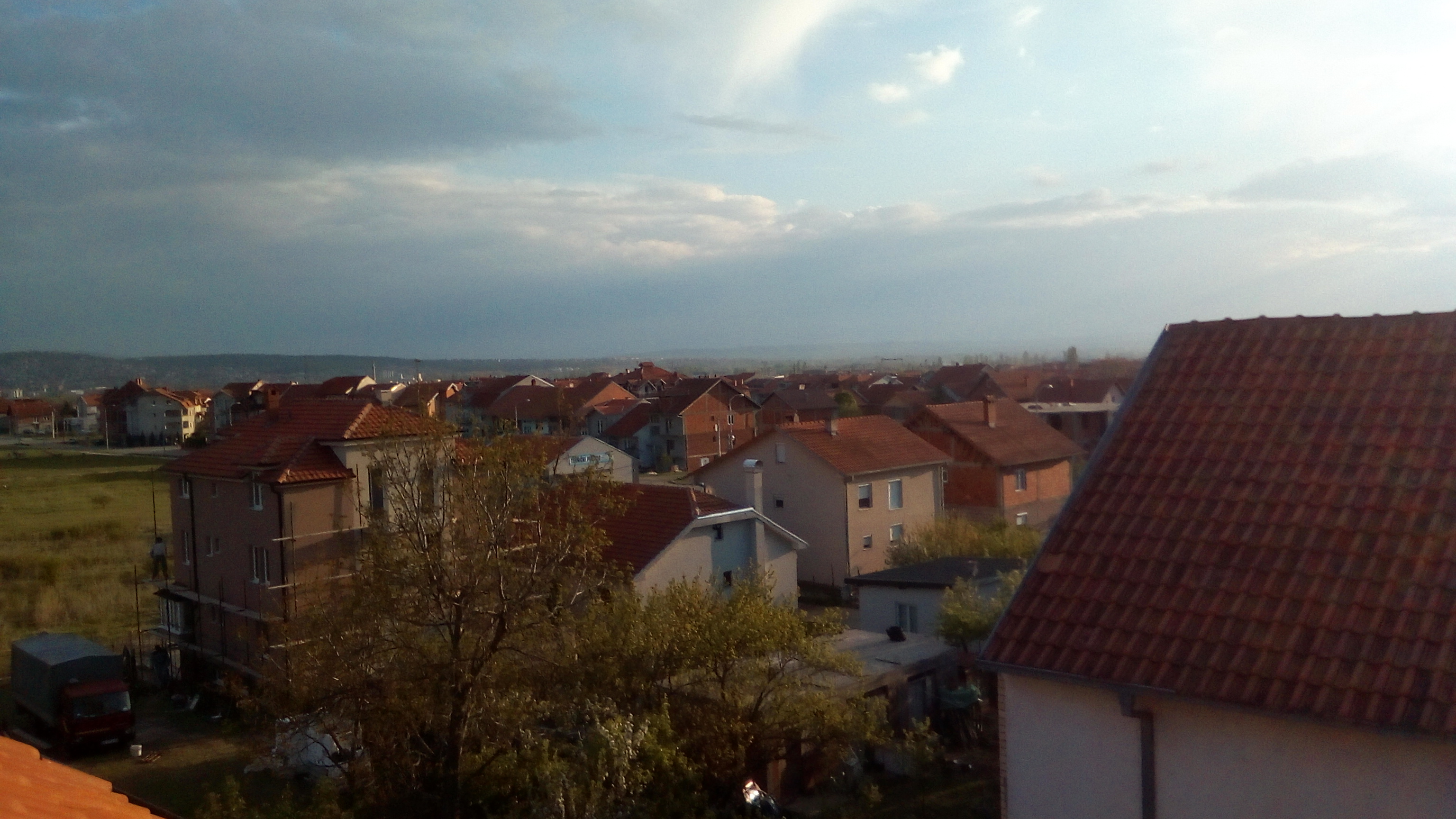 насеље Б. Б.